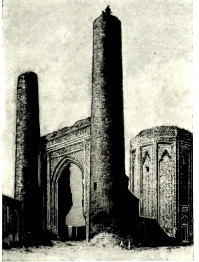 Atabəylər Memarlıq Kompleksində Mömünəxatun türbəsi və minarələr